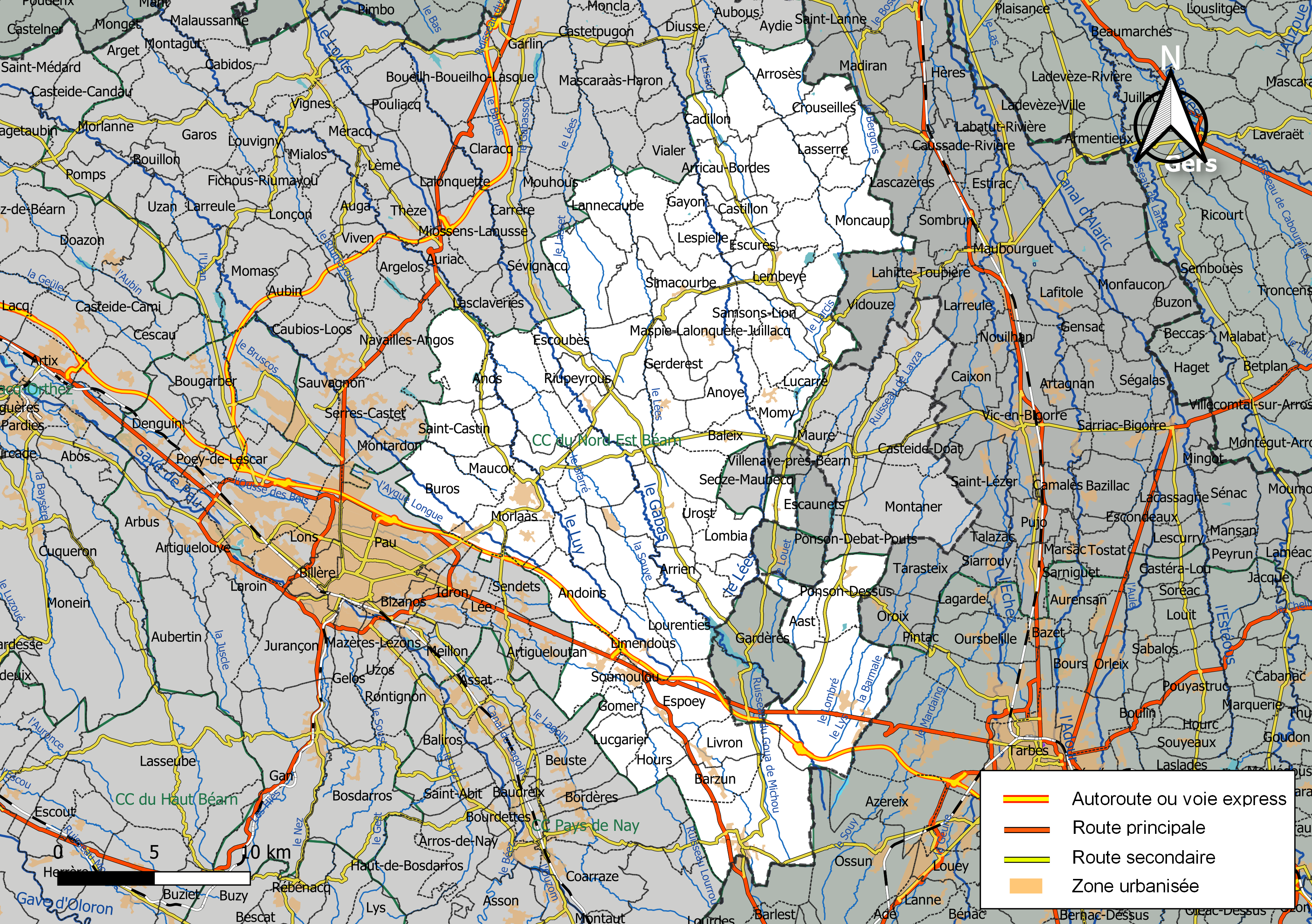 Carte géographique de la Communauté de communes du Nord Est Béarn, département des Pyrénées-Atlantiques, France. Composition au 1er janvier 2019.